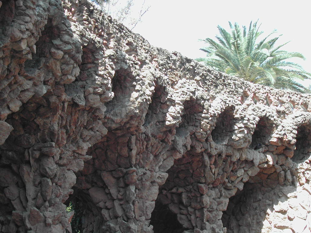 Parc Güell - Viaducto Bajo